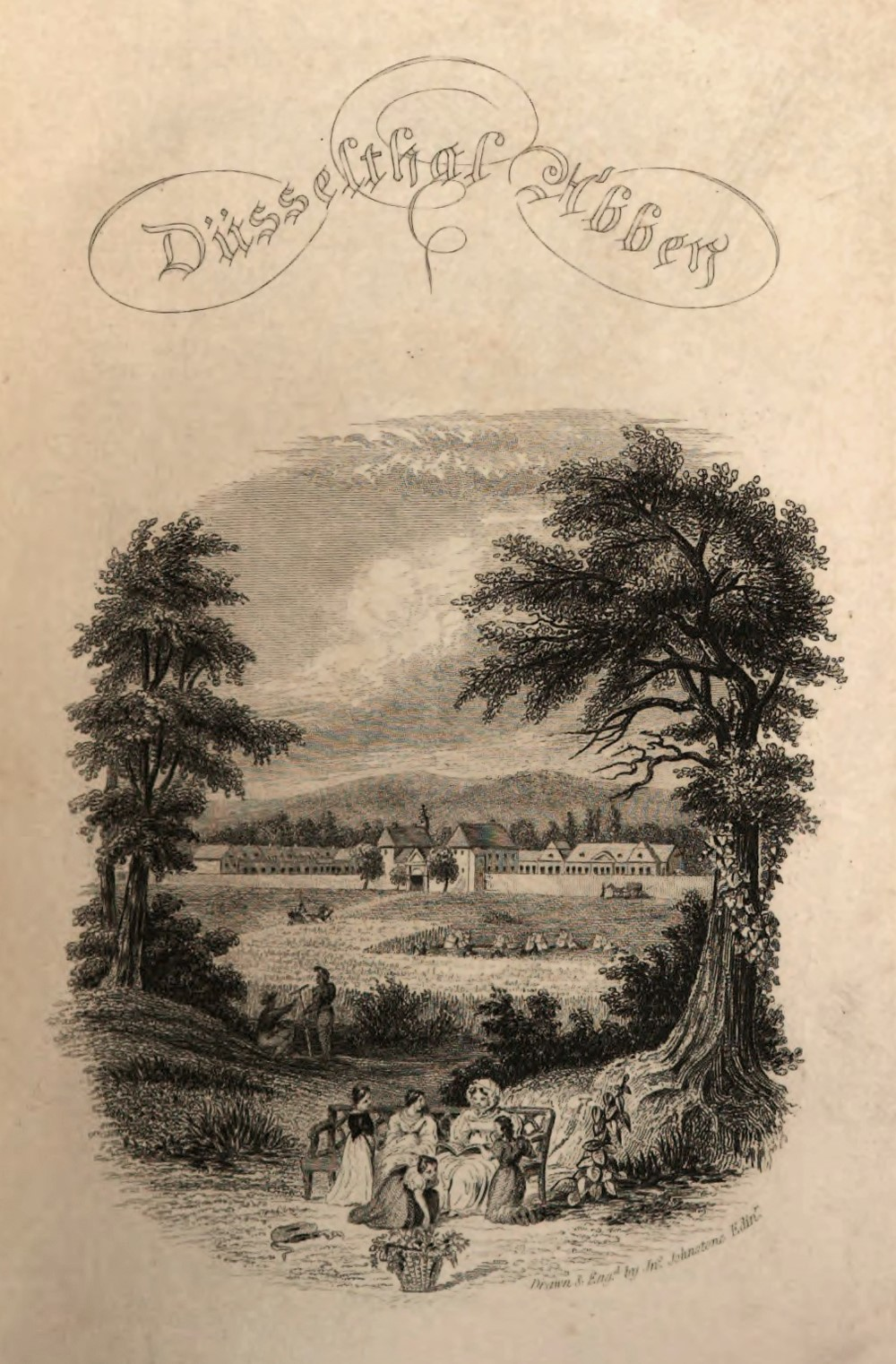 Düsselthaler Anstalten des Grafen Recke-Volmerstein (Gesamtansicht ca. 1836)